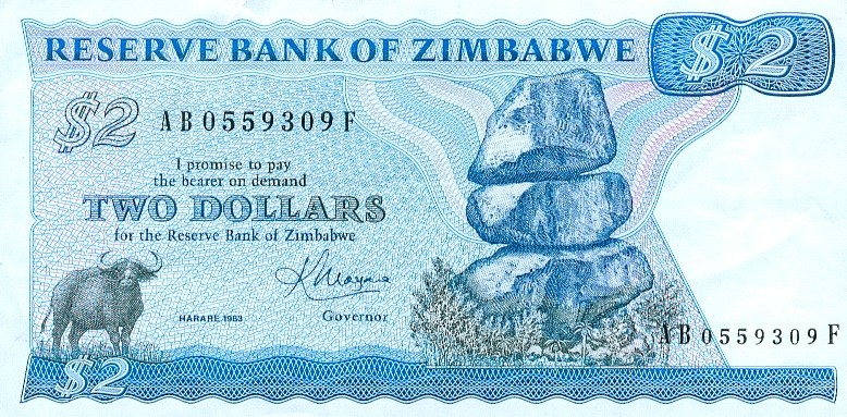 Auteur : FC Georgio Sujet : billet de 2 dollars du Zimbabwe (année 1983)